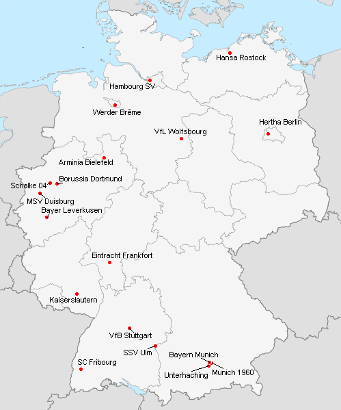 Répartition des clubs en 1.Bundesliga 1999-2000.